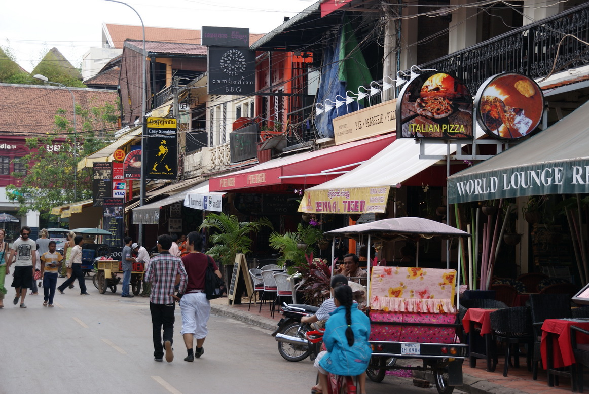 Siem Reap Pubstreet